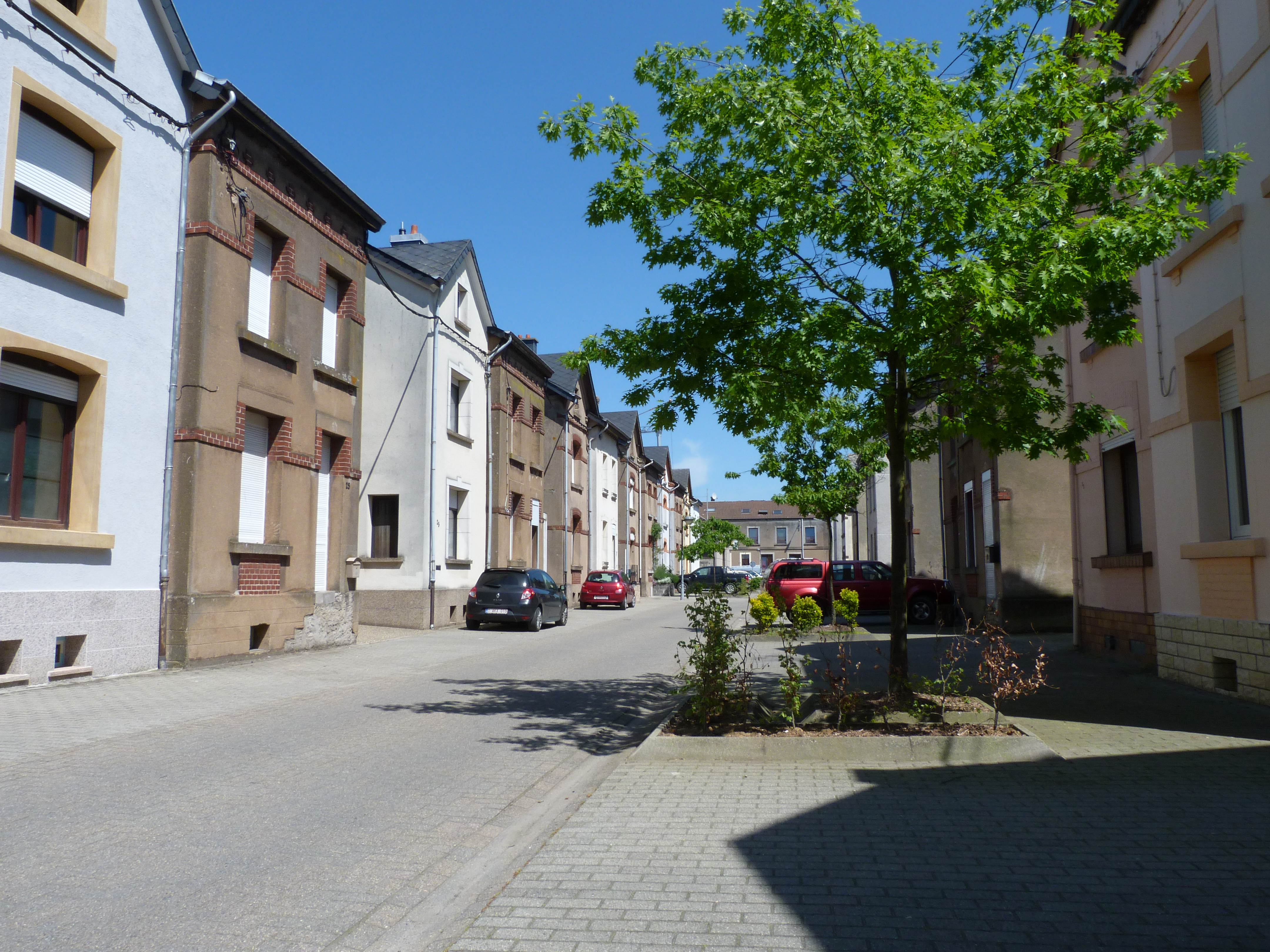 La rue Ougrée et ses maisons ouvrières typiques datant du temps de l'usine d'Athus (ici en juin 2013)